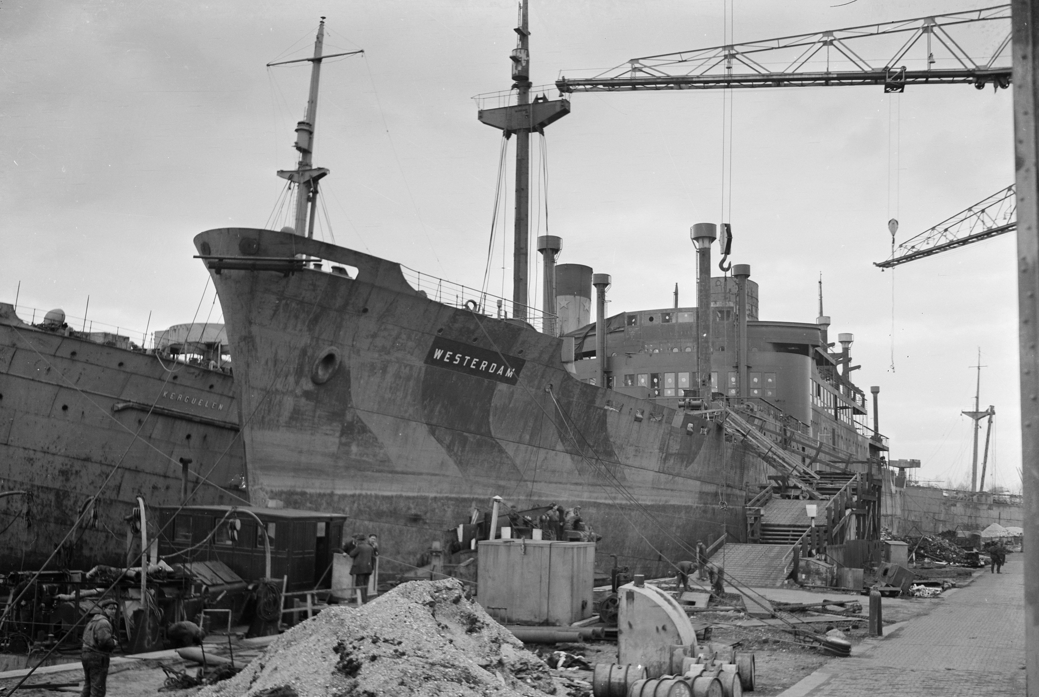 Collectie / Archief : Fotocollectie Anefo Reportage / Serie : [ onbekend ] Beschrijving : "Westerdam" in aanbouw op werf Wilton-Fijenoord Datum : 19 februari 1946 Locatie : Rotterdam, Zuid-Holland Trefwoorden : scheepsbouw, schepen Instellingsnaam : Westerdam, Wilton-Fijenoord Fotograaf : Hof, […] van 't / Anefo Auteursrechthebbende : Nationaal Archief Materiaalsoort : Negatief (zwart/wit) Nummer archiefinventaris : bekijk toegang 2.24.01.03 Bestanddeelnummer : 901-4774